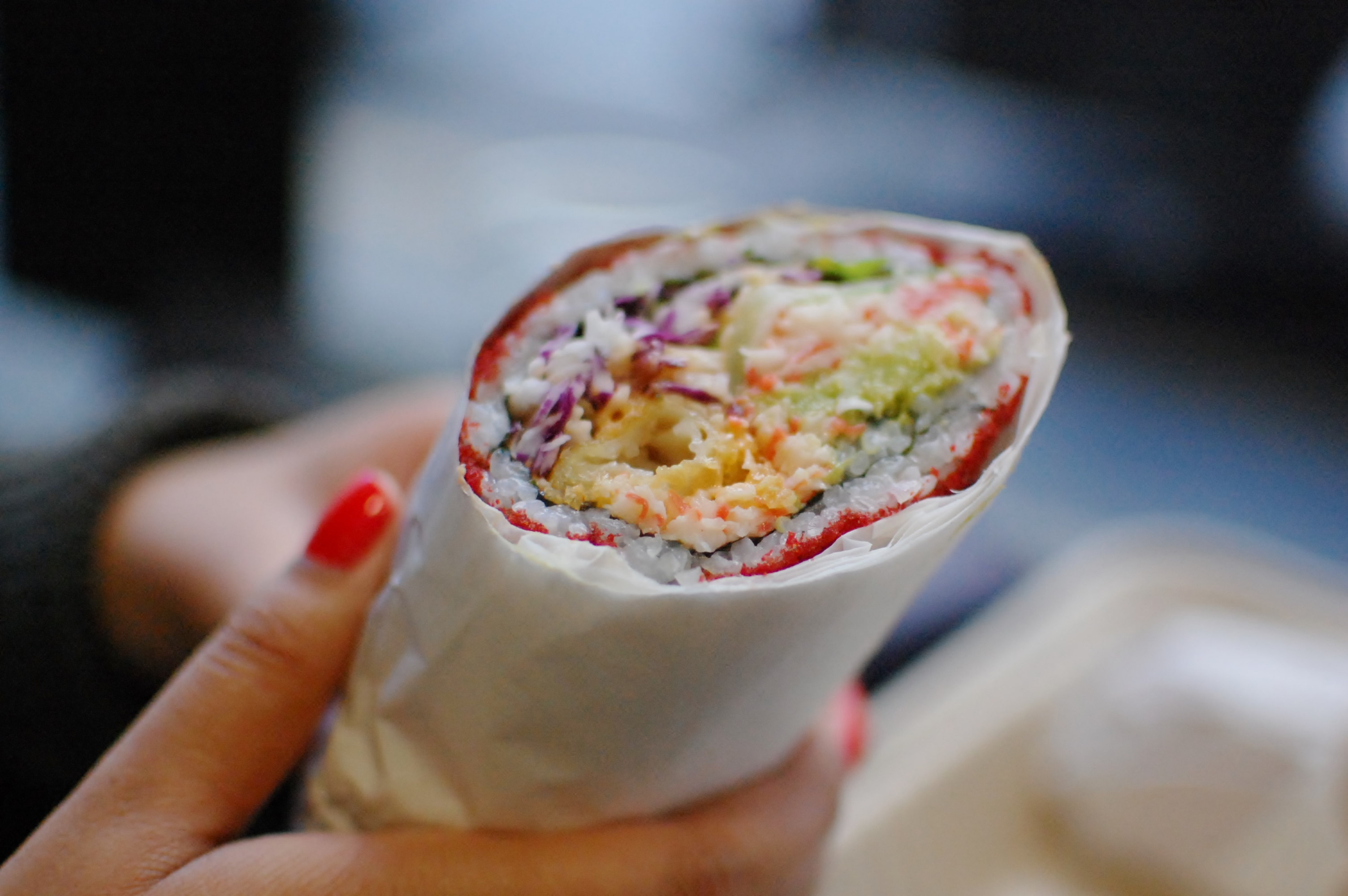 sushirrito